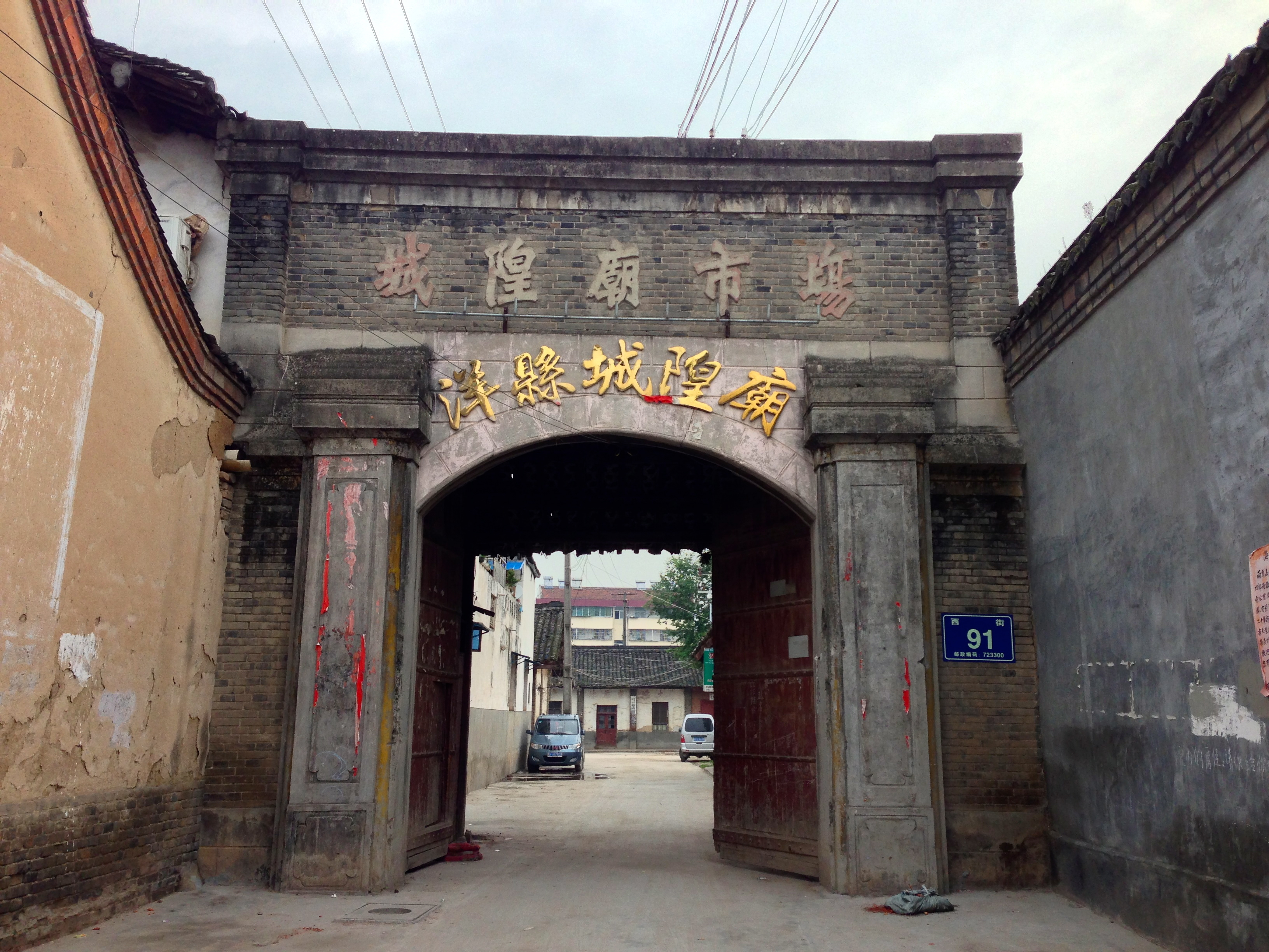 城隍廟